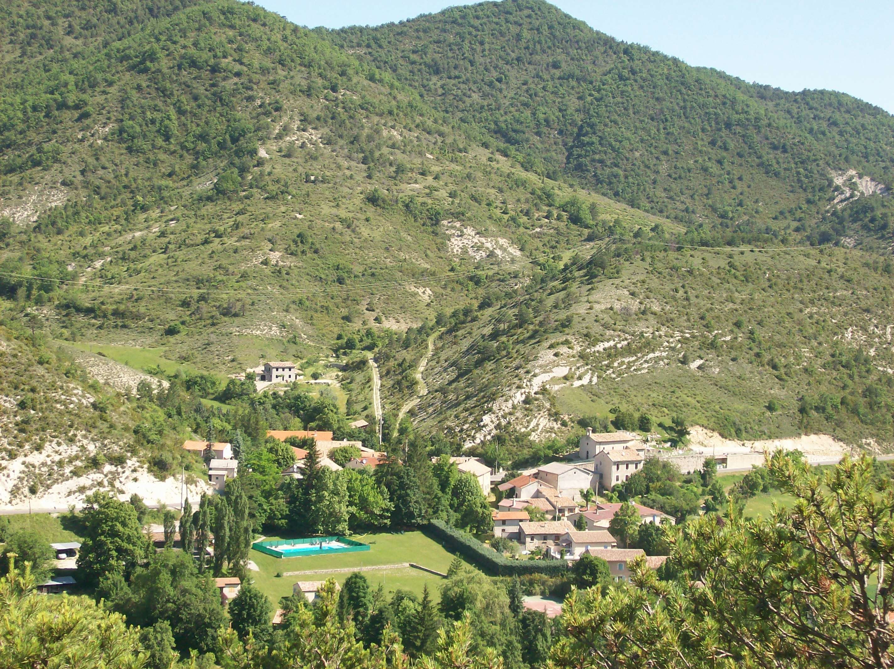 Vue générale du hameau des Bégües sur la commune de Sainte-Colombe (Hautes-Alpes)